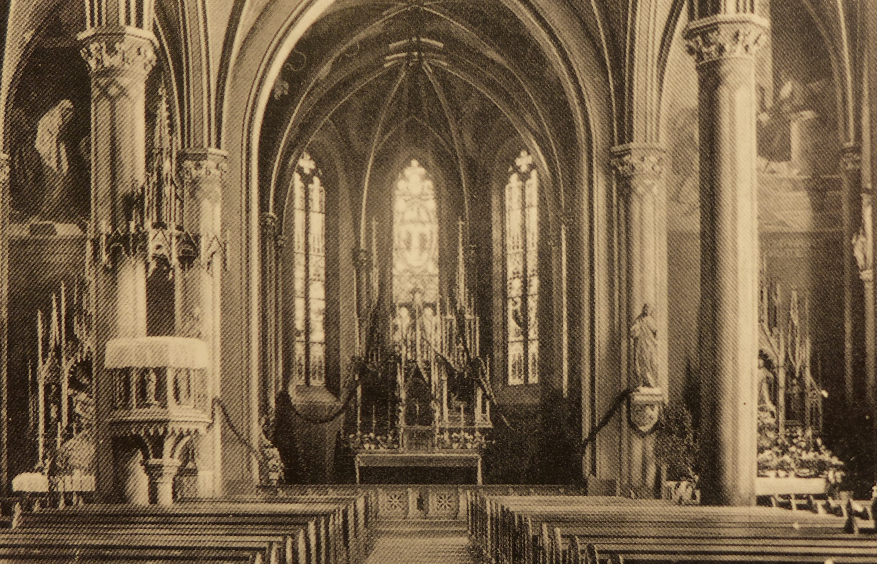 Heilige Dreifaltigkeit und St. Marien (Lebach), Kircheninneres um 1900